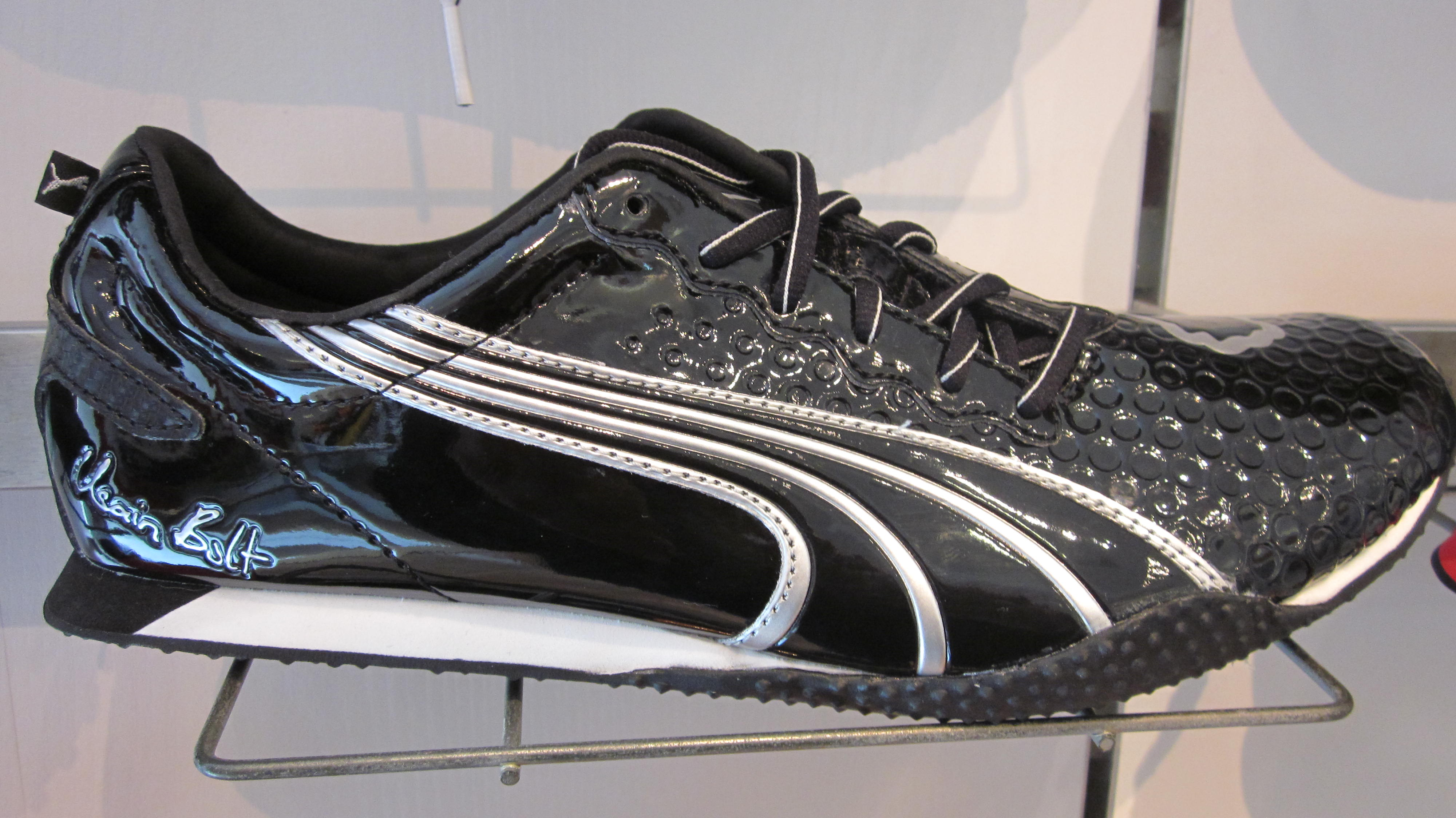 A Puma Street Yaam